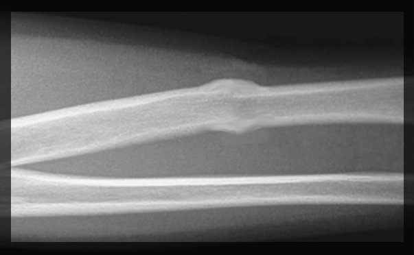 Kallusbildung nach Radiusfraktur (Fotomontage)